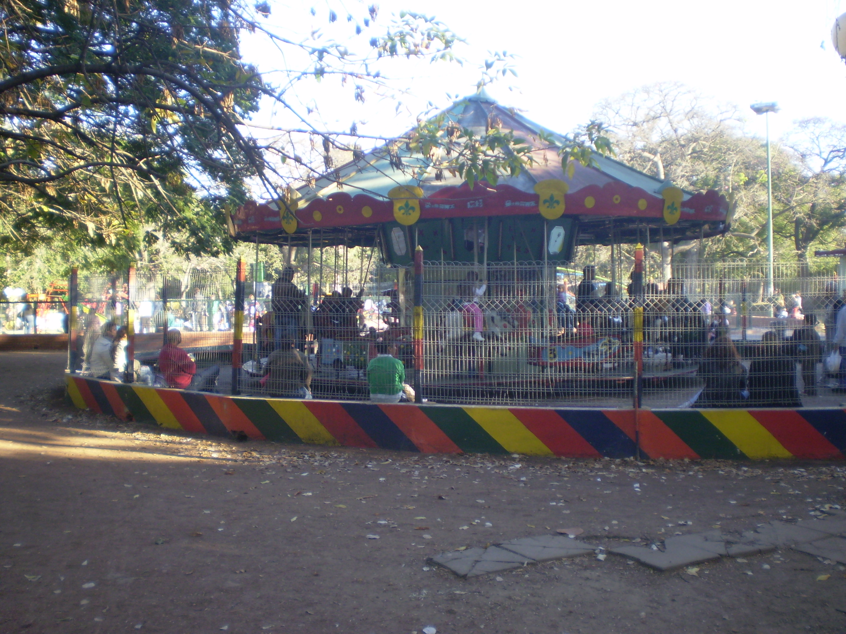 Calesita. Parque Avellaneda, Buenos Aires